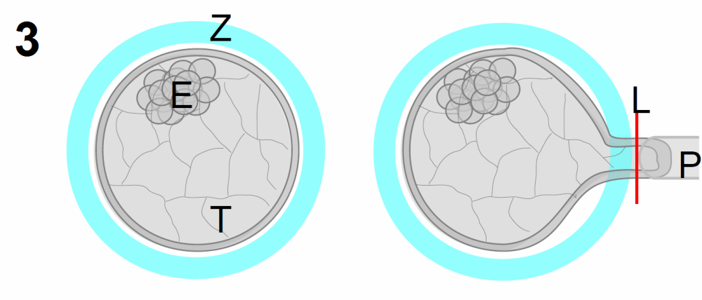 Biopsie trofektodermu pro preimplantační genetickou diagnostiku